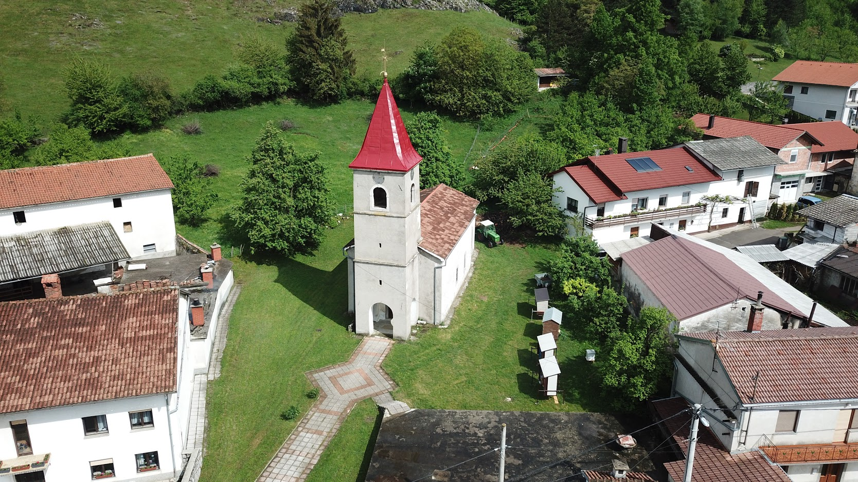 Cerkev Svetega Antona, ki stoji v sredi vasice Koritnice.